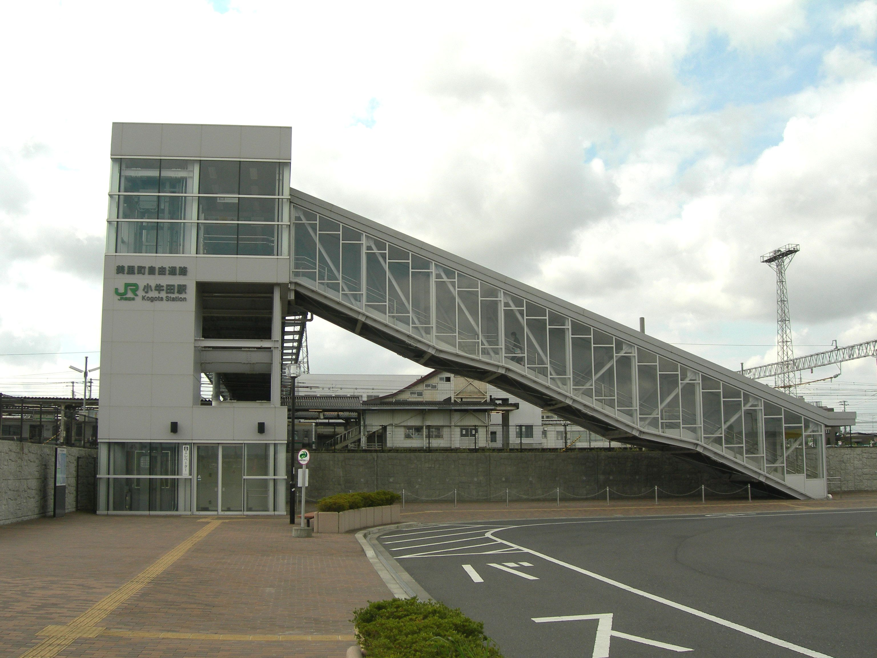 JR東日本 小牛田駅東口